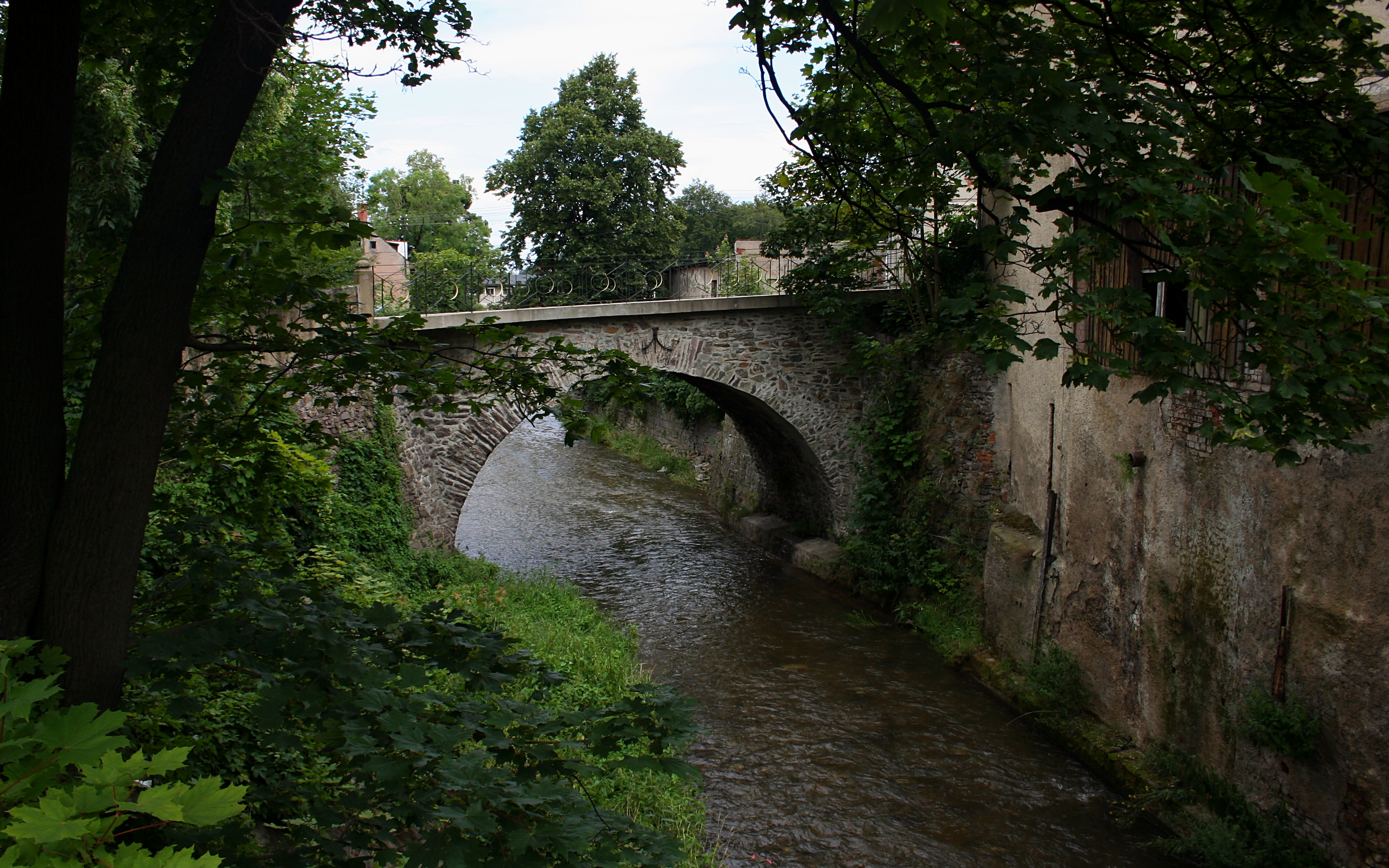 Nysa Szalona przepływająca przez Bolków